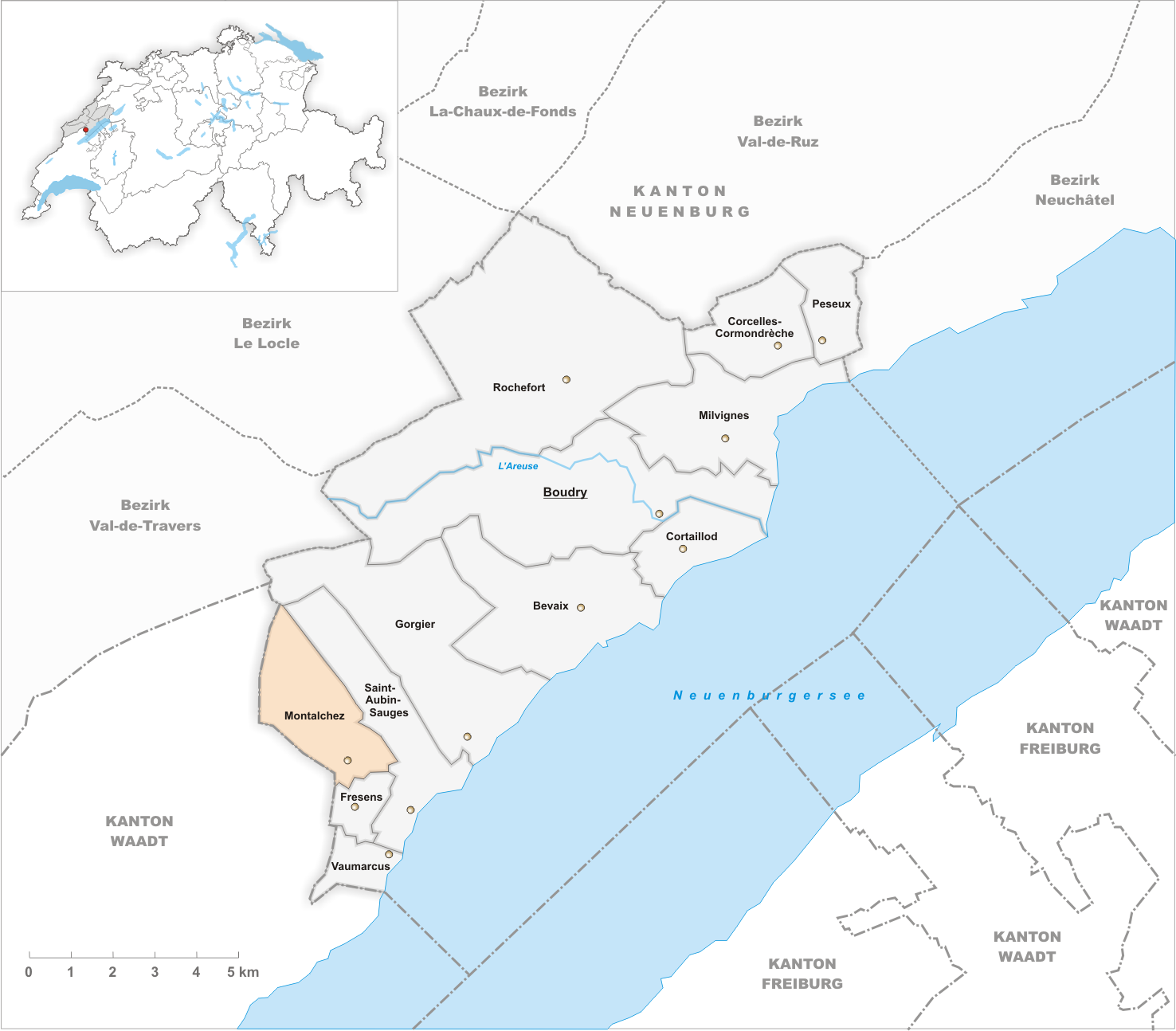 Municipality Montalchez